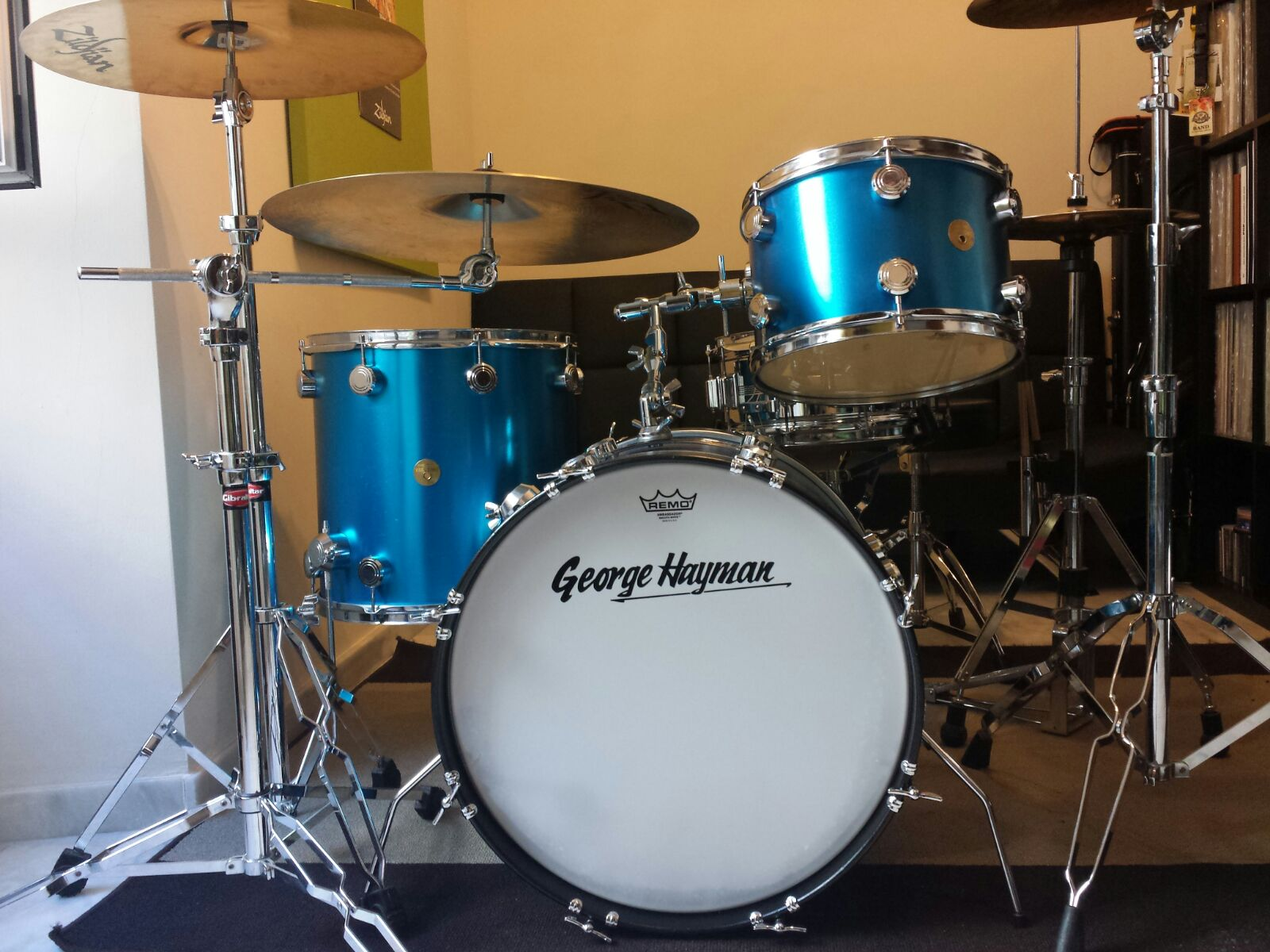 Kit Hayman